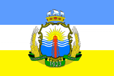 Прапор Скадовського району